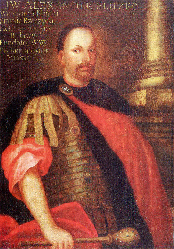 Беларуская (тарашкевіца): Партрэт Аляксандра Слушкі (Alaksandar Słuška)